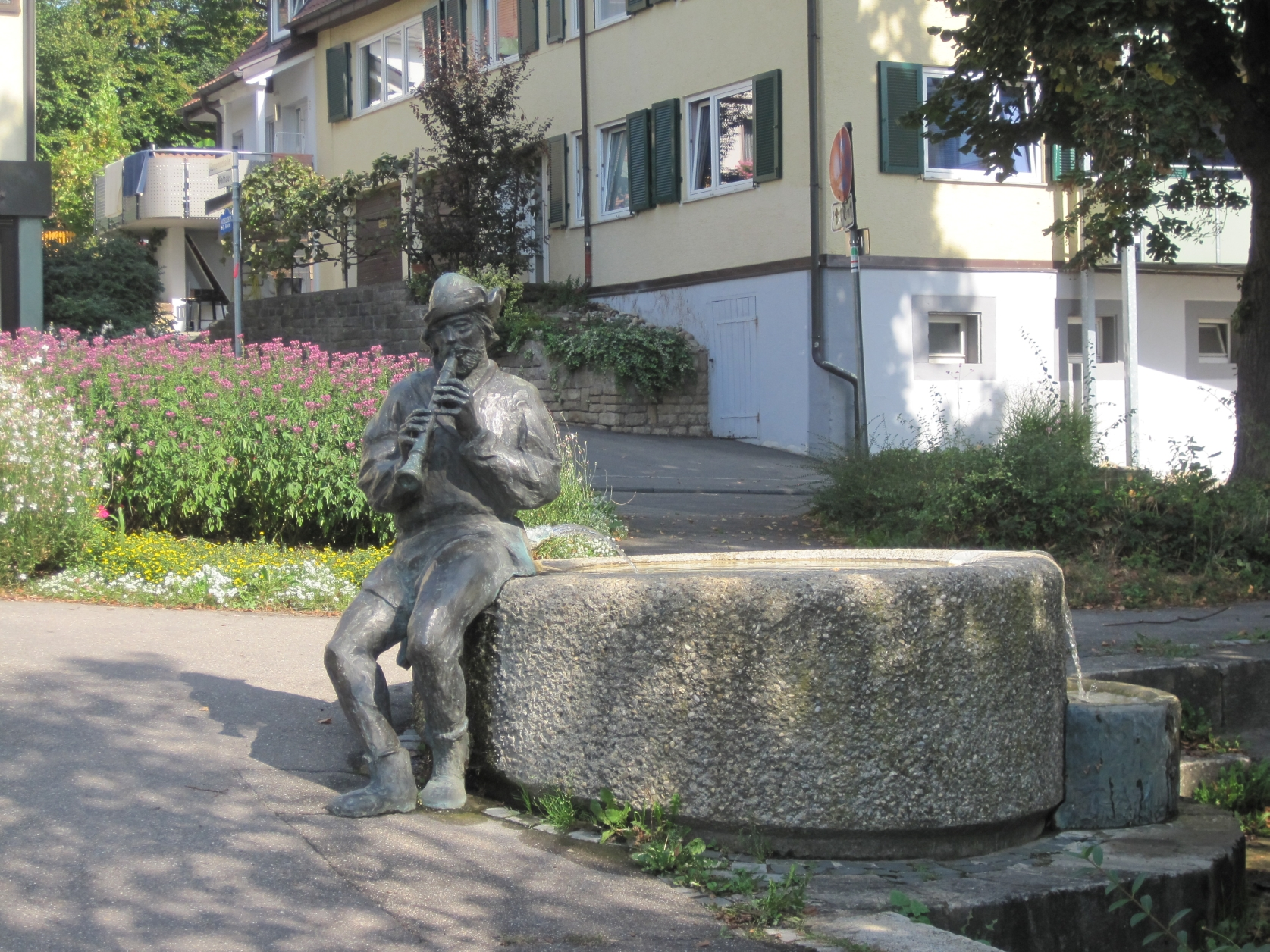 Der Pfeiferbrunnen im Nürtinger Stadtteil Hardt. Der Pfeifer von Hardt ist eine Romanfigur in Wilhelm Hauffs Roman Lichtenstein.